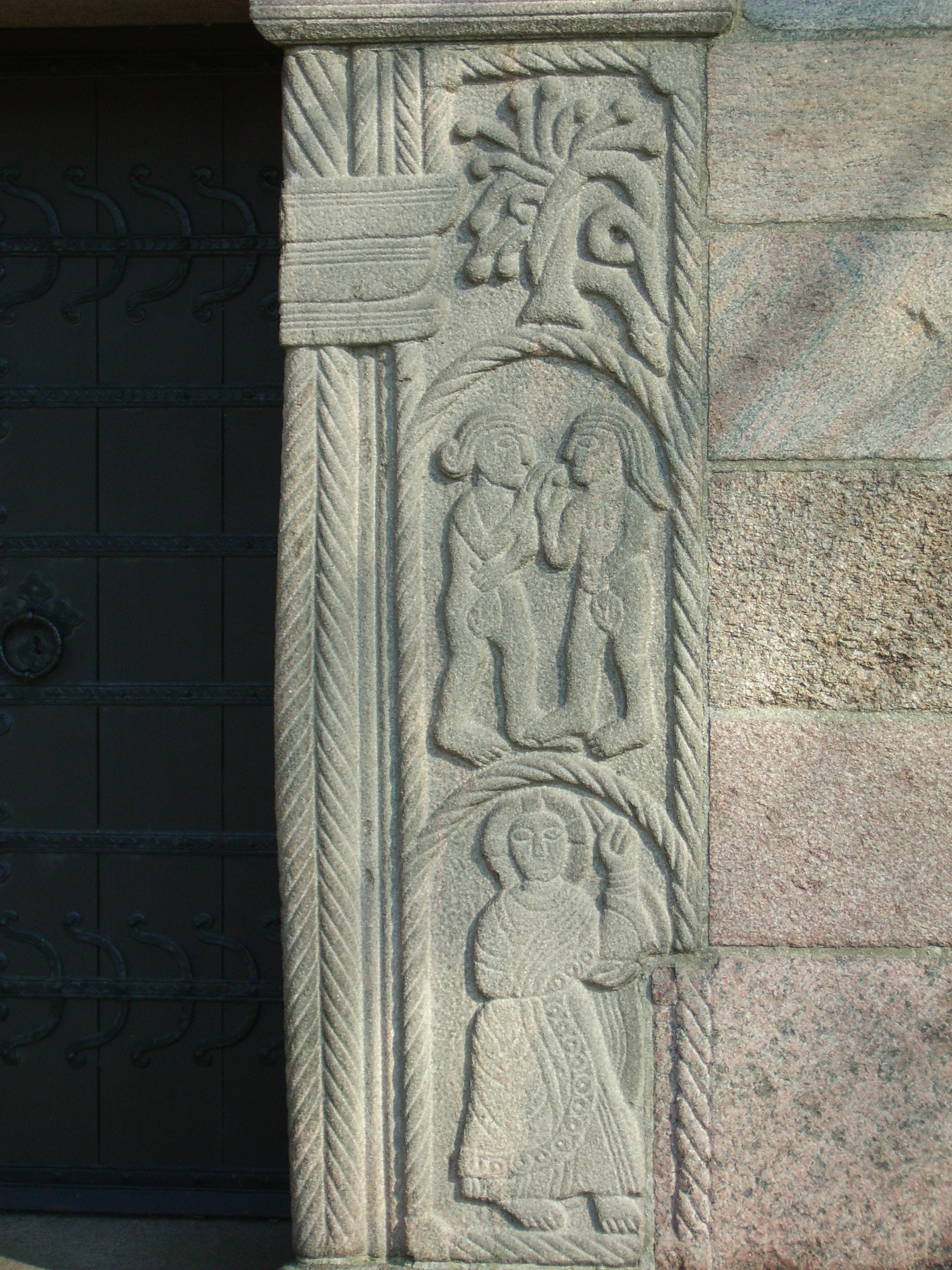 Vejlby Kirke,Norddjurs Kommune. Hårders protal right side